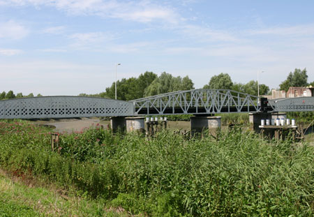 (Mirabrug 1 , eigen foto augustus 2004, hiermee onder GFDL gebracht ) categorie:Afbeelding brug